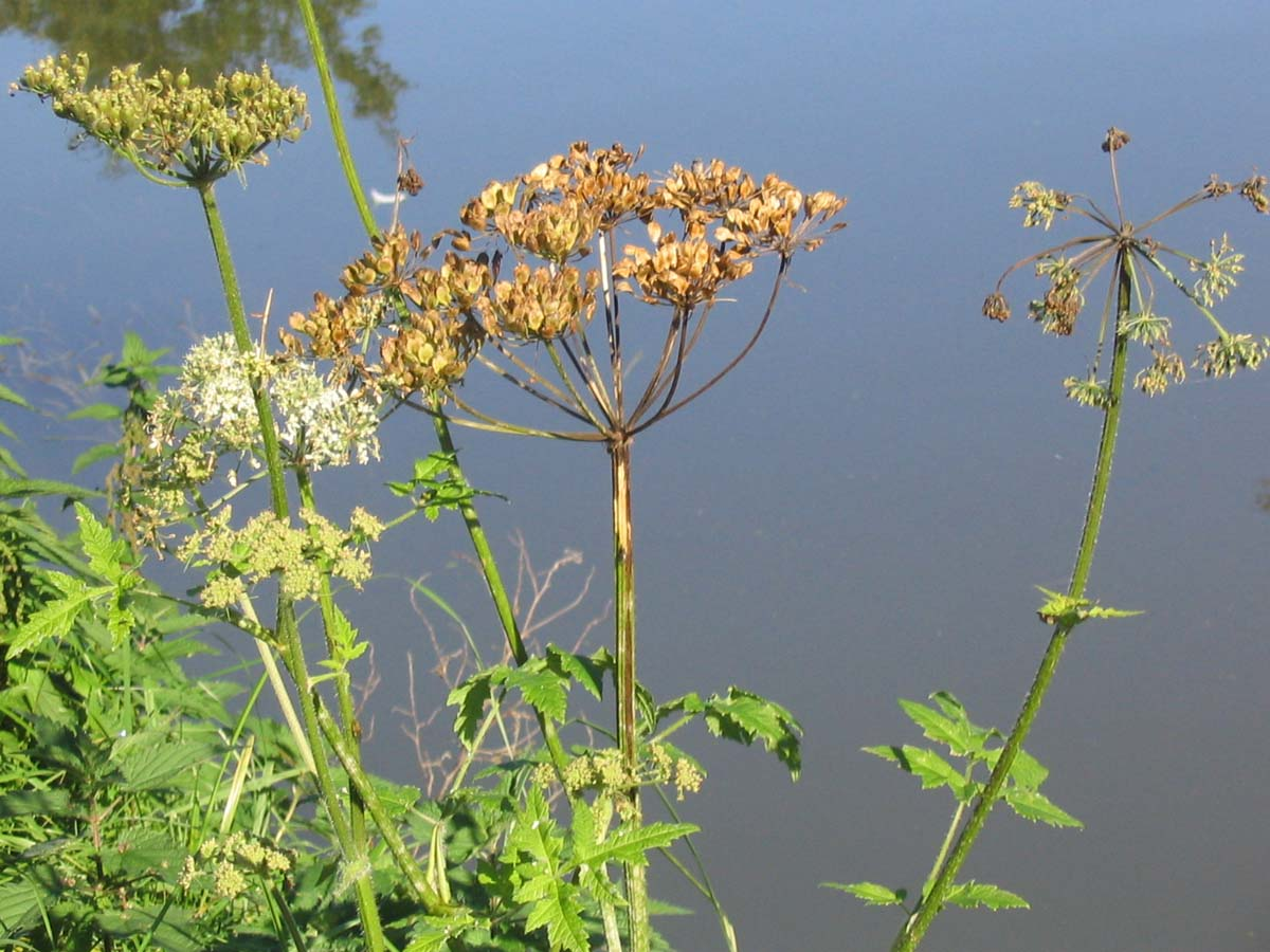 Gewone berenklauw (uitgebloeid). Zelfgemaakte foto.